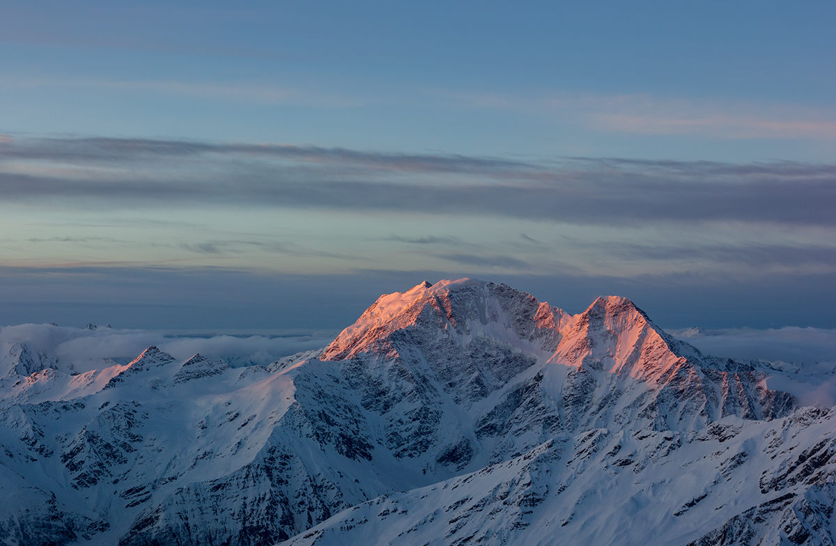 Приэльбрусье: Центральный Кавказ, среднегорная и высокогорная зоны (1400 - 5642 м) в пределах Главного Кавказского и Бокового хребтов. Территория национального парка занимает верховья рр. Малки и Баксана. С северо-запада национальный парк граничит с Карачаево-Черкесской Республикой, с запада - со Ставропольским краем. На юго-западе граница национального парка совпадает с государственной границей между Россией и Грузией. С юга и востока граница проходит по территории Кабардино-Балкарской Республики, соответственно по водоразделу между реками Баксан и Чегем. Расположен Национальный парк в 90 км к западу от г. Нальчика в высокогорной части бассейнов рек Баксана и Малки, в пределах Главного Кавказского (северный склон), Бокового и Передового (южный склон ) хребтов, Зольский район, Кабардино-Балкария This image is related to the protected area of Russia number 0700010